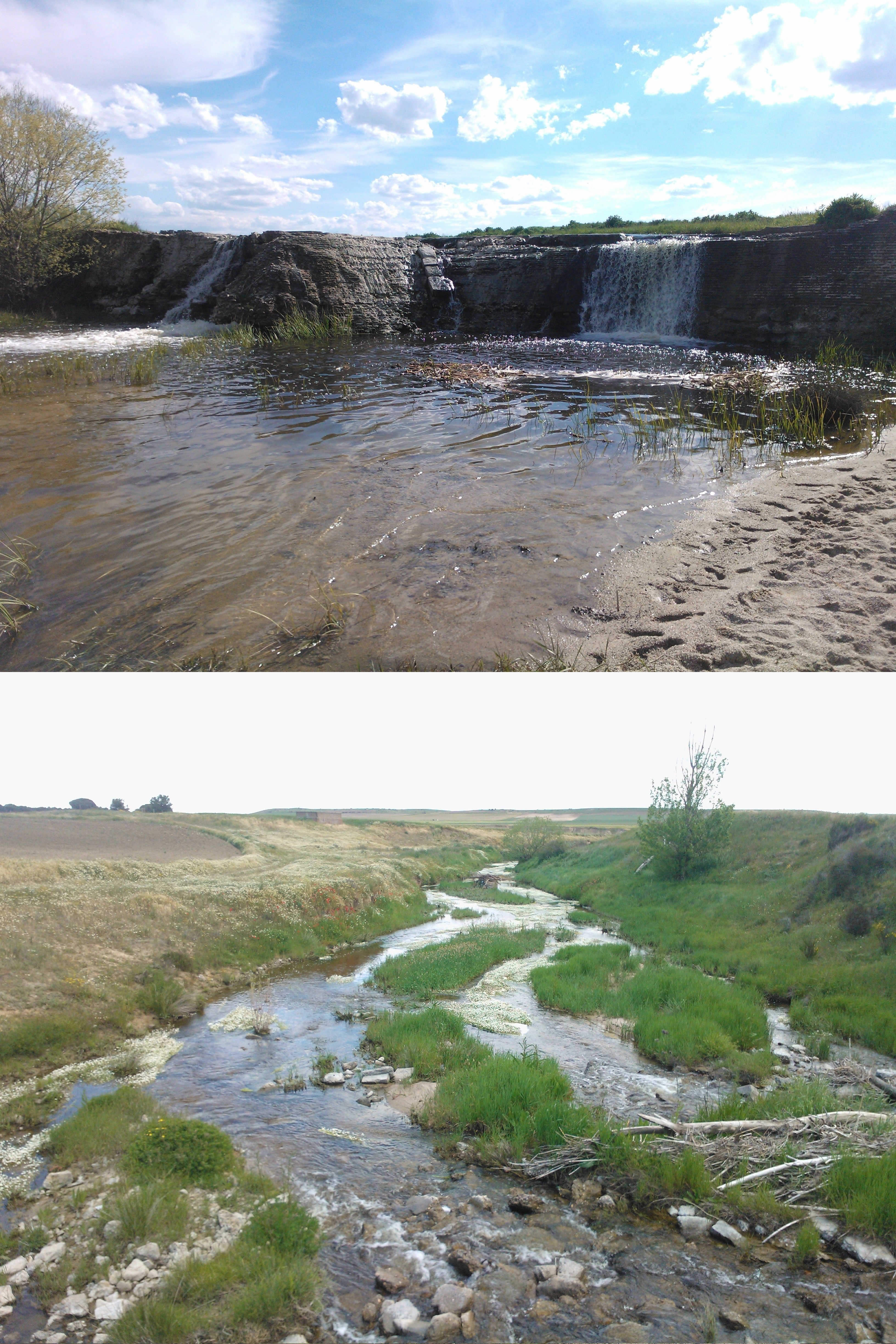 Rio Arevalillo a su paso por Pedro-Rpdríguez